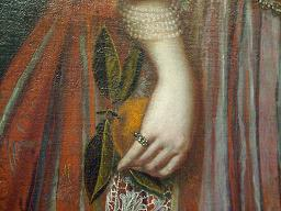 ein Detail des Gemäldes " die Elisabeth Balasa" 17.Jahrhundert. Elisabeth Balasa war die Ehefrau des Nicolaus Illeshazy. Der Maler dieses Gemäldes war Johan Hoffstäter 1677.